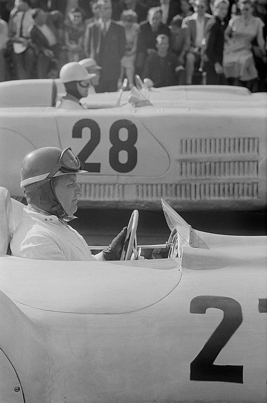 Original image description from the Deutsche Fotothek Portrait Arthur Rosenhammers in einem EMW 1500ccm-Sportwagen im Hintergrund Heinz Melkus in einem Veritas beim 6. Leipziger Stadtparkrennen